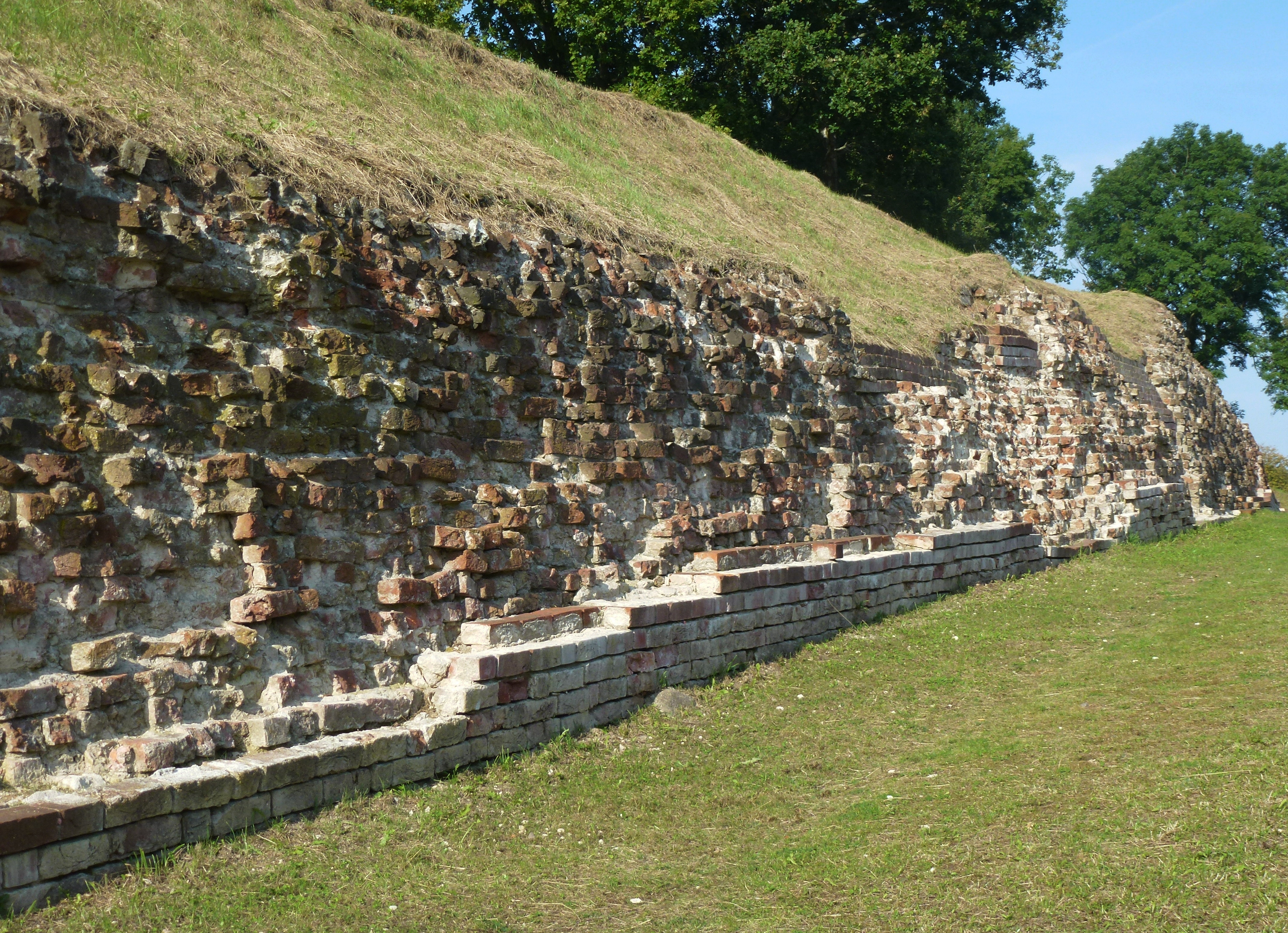 Valdemar's Wall